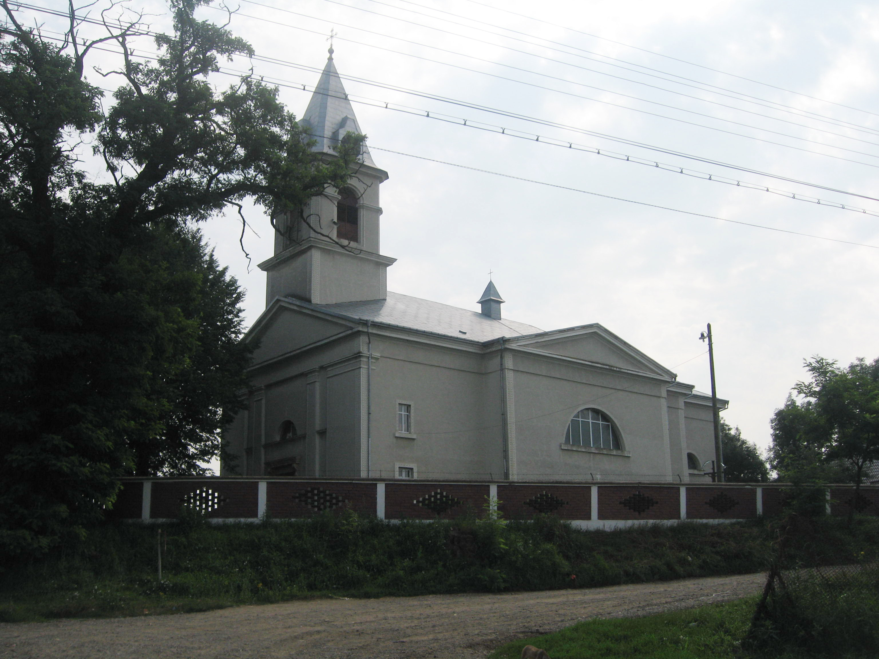 Biserica Adormirea Maicii Domnului din Dornești, Suceava County, Romania, fostă biserică catolică